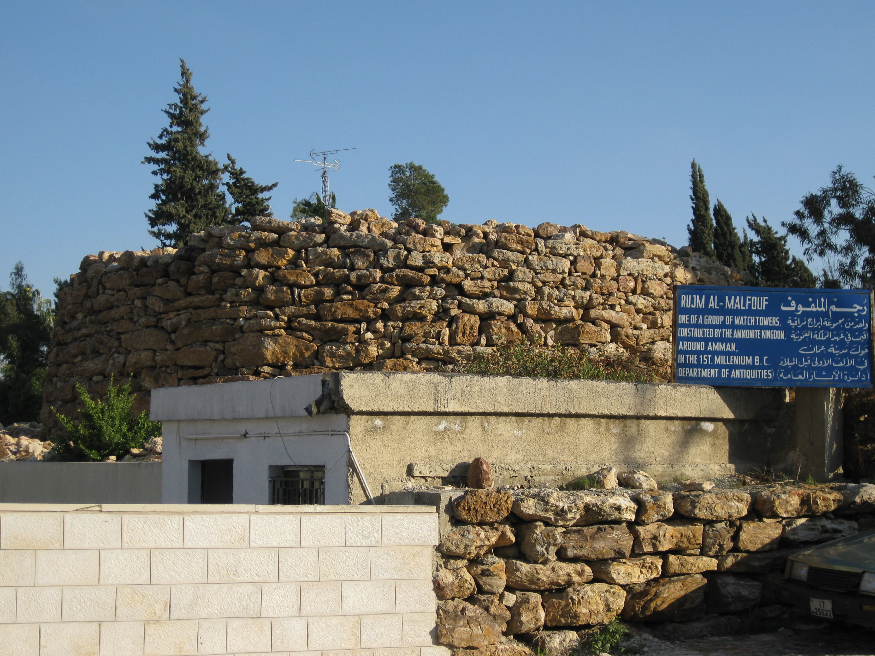 Rujm Al Malfouf